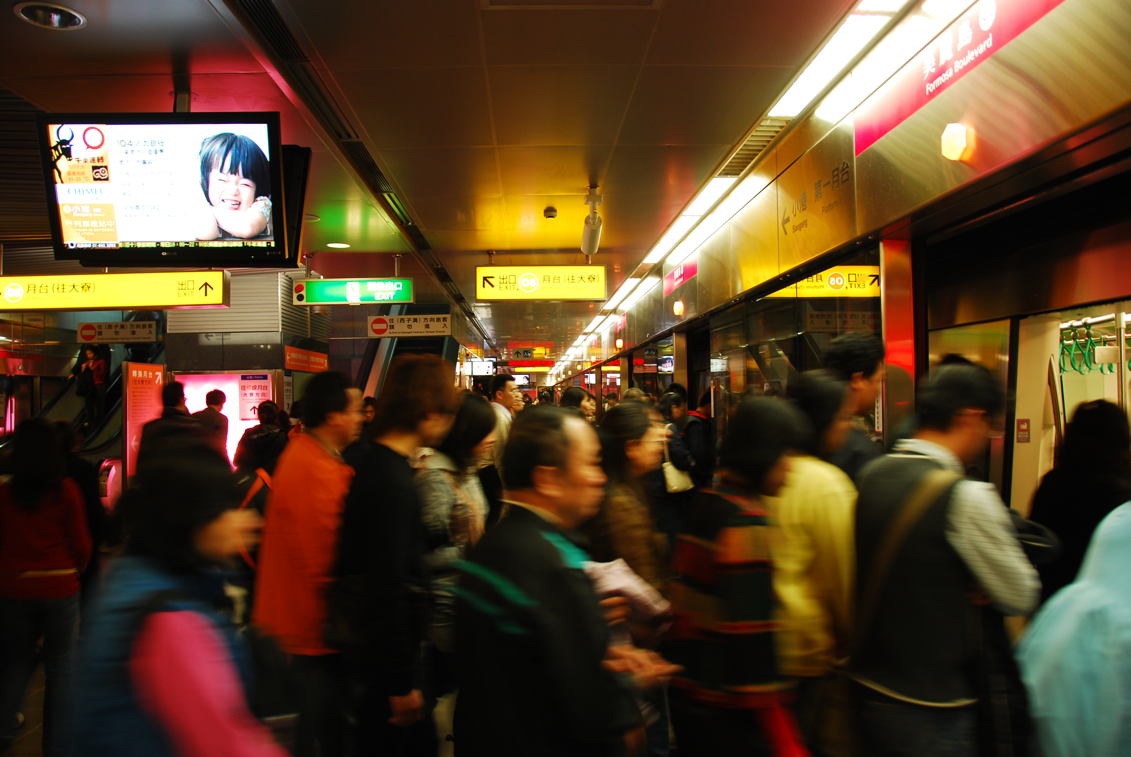 中文（台灣）: 高雄捷運美麗島站紅線月台層